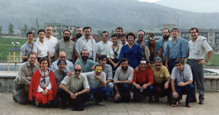 Euskara helduei irakasteko gau-eskoletan lehenenegoetariko bat izan zen Santutxukoa 1966an. Garai hartako hainbat ekintzaile.